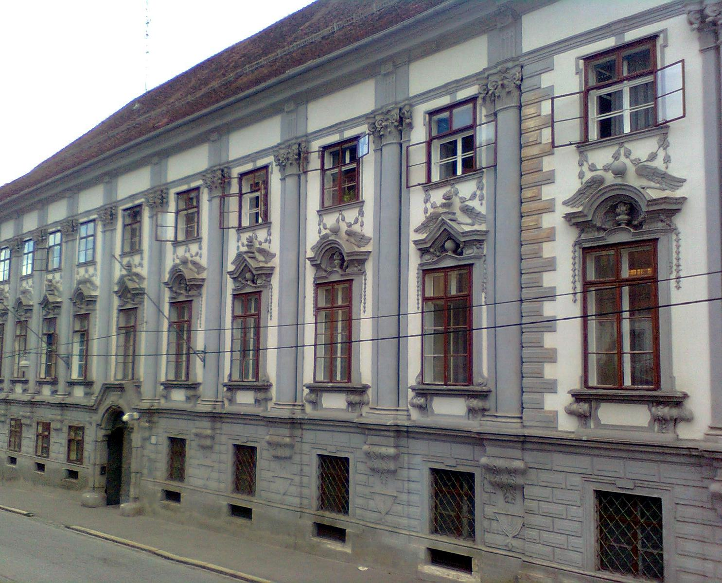 Palais Wildenstein, Graz, Schauseite